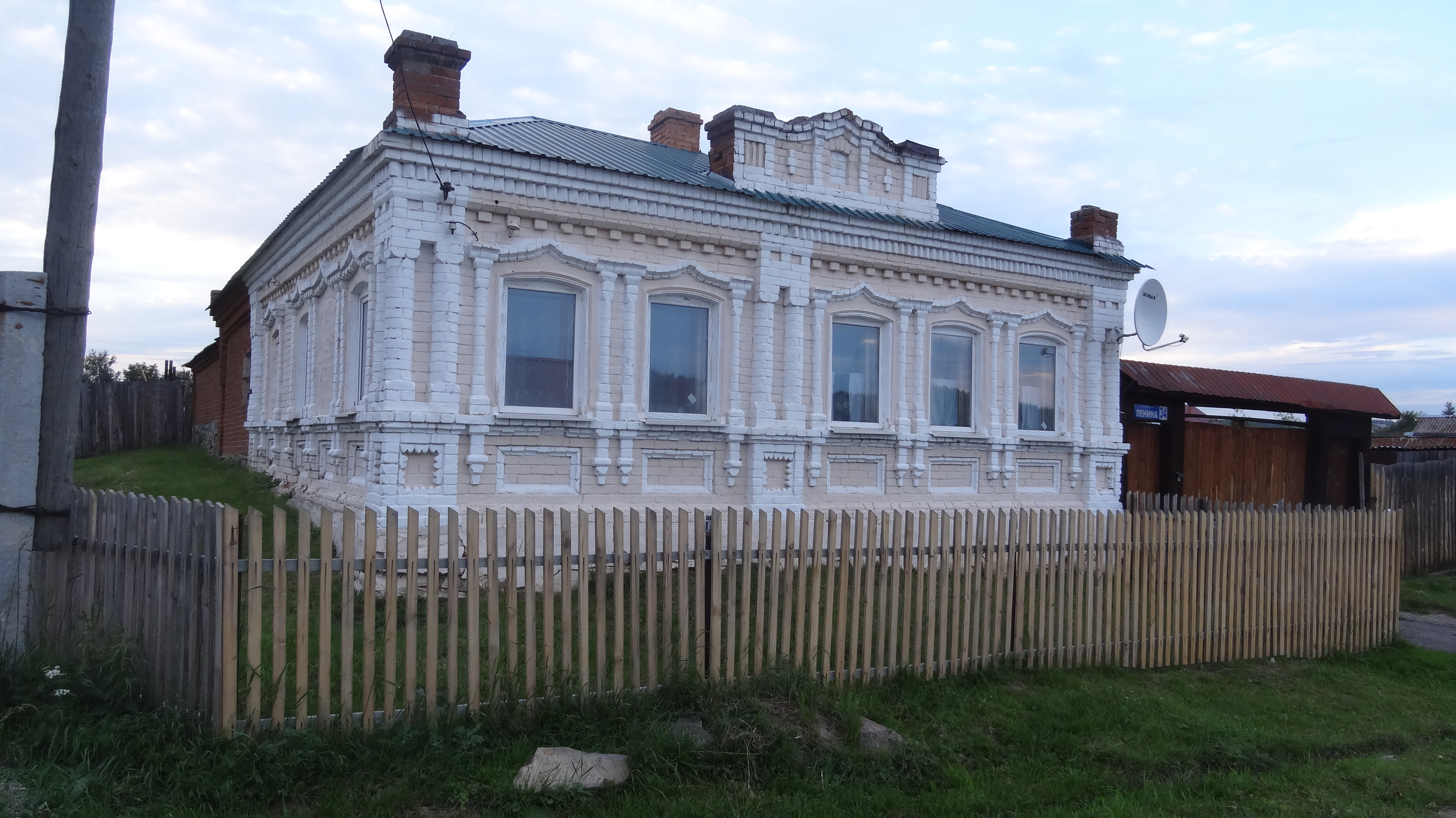 Дом в купеческом стиле в селе Исетское, Свердловской области.